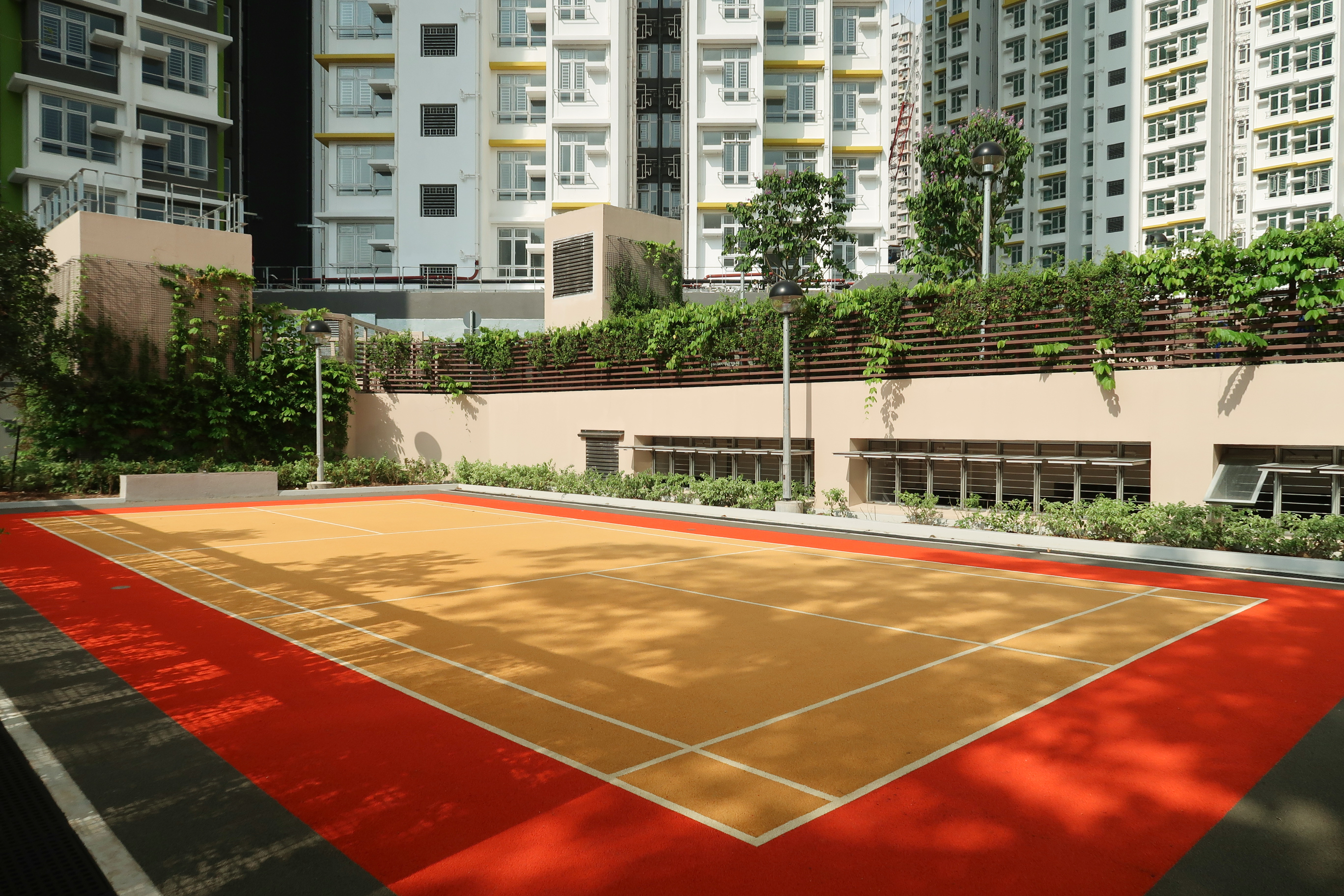 Lai Tsui Court Badminton Court